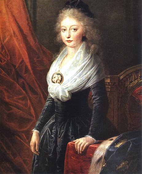 Die junge Herzogin von Angoulême; Das Bild entstand nach 1795 in Wien. Die Beschriftung lautet: "Marie Therese Charlotte France née...in 1778 peint à Vienne par...Füger". Das Gemälde selbst wurde 1859 von der Ermitage erworben. Einige Zeit befand es sich im Schloss Gattschina in der Nähe von St. Petersburg und wurde 1917 der Ermitage zurückgegeben, Ermitage St. Petersburg - Inventar-Nr. 1344.